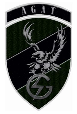 Oznaka rozpoznawcza JW AGAT na mundur wyjściowy ustanowiona decyzją Nr 100/MON MINISTRA OBRONY NARODOWEJ z dnia 29 marca 2012 r. w sprawie wprowadzenia oznaki rozpoznawczej Jednostki Wojskowej AGAT